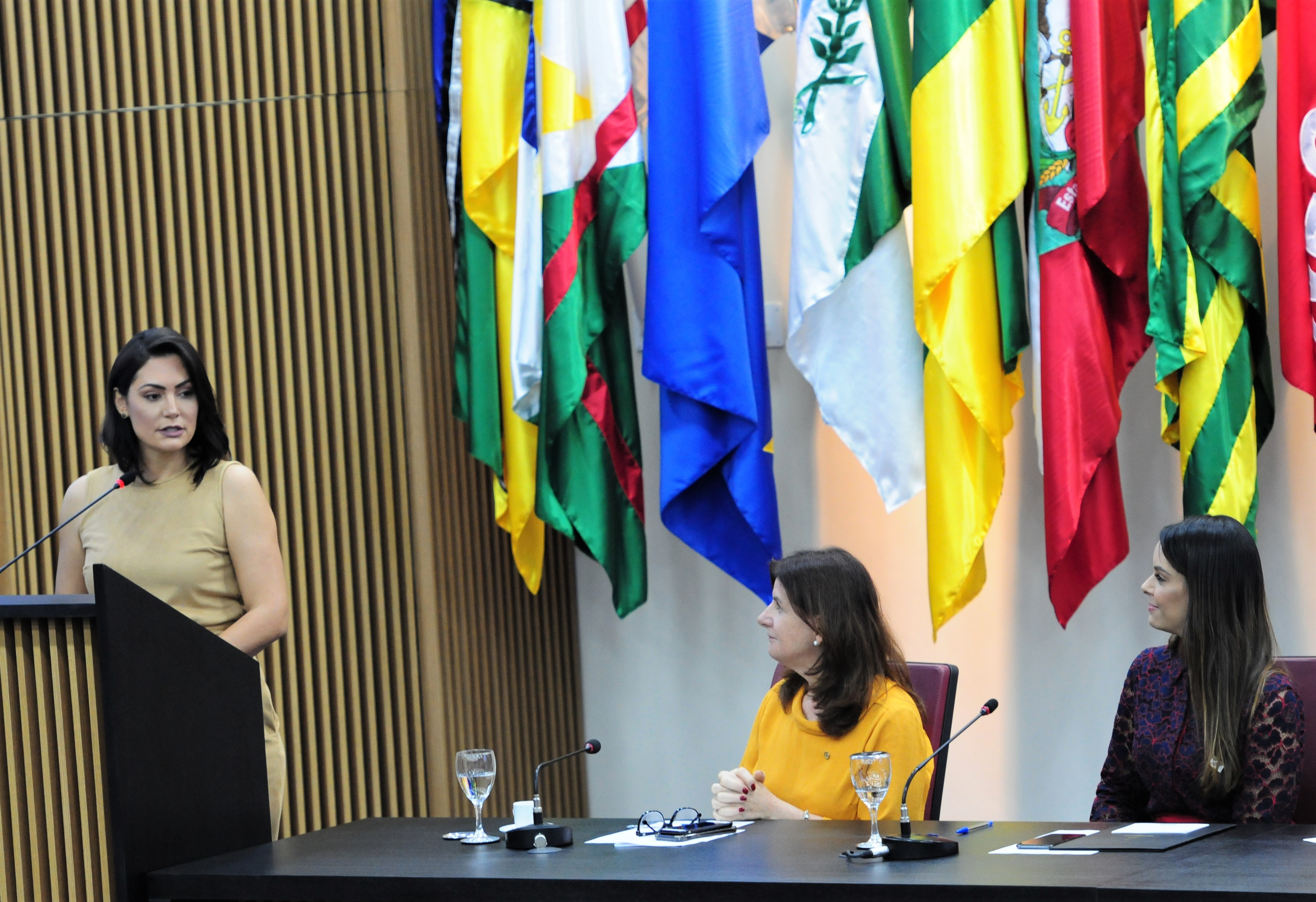 Mantendo a política de integração e convergência nas pautas sociais com o governo federal, a primeira-dama do Distrito Federal, Mayara Noronha, participou da cerimônia de lançamento do Projeto Sinais, nesta quarta-feira (18/12), no auditório do Ministério da Cidadania, na foto a primeira dama Michele Bolsonaro.